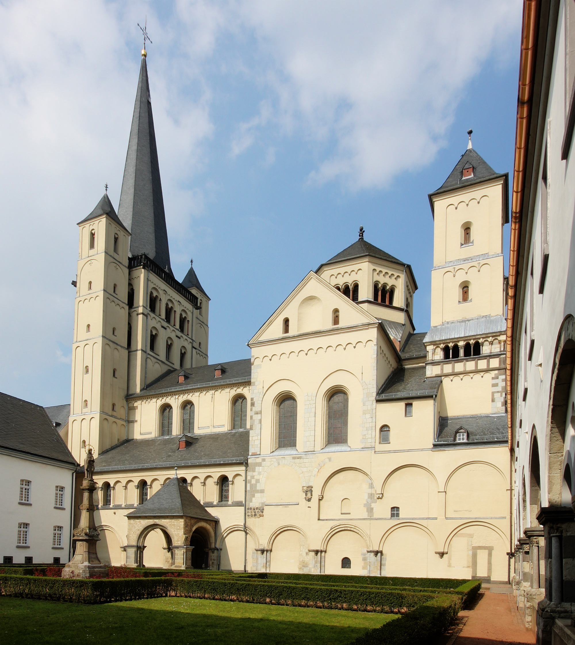 Pulheim-Brauweiler, denkmalgeschützte Pfarrkirche St. Nikolaus, ehemalige Abteikirche Abtei Brauweiler This is a photograph of an architectural monument. /001